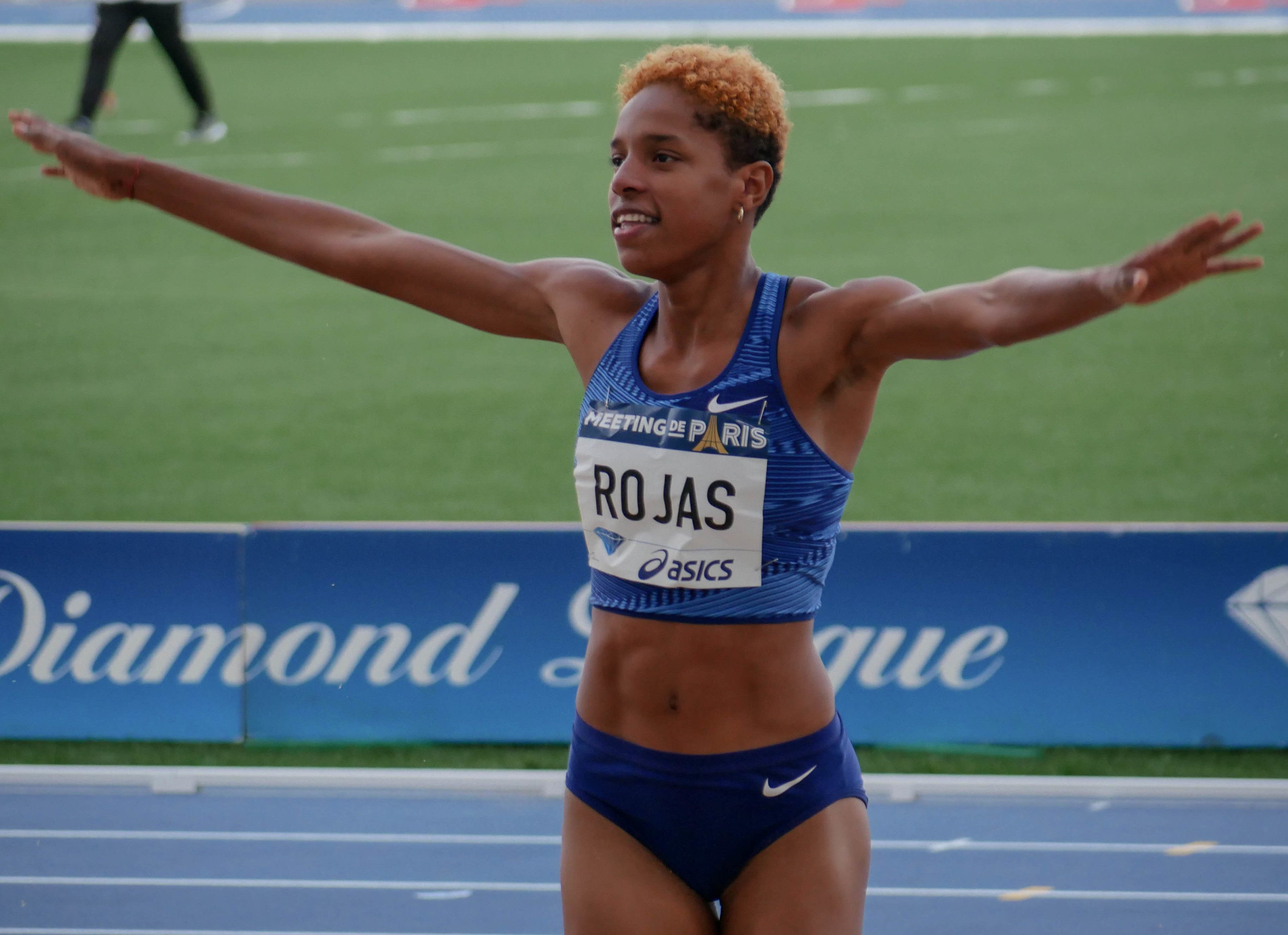 Meeting de Paris 2019 - Compétition d'athlétisme au stade Charlety - 24 août 2019